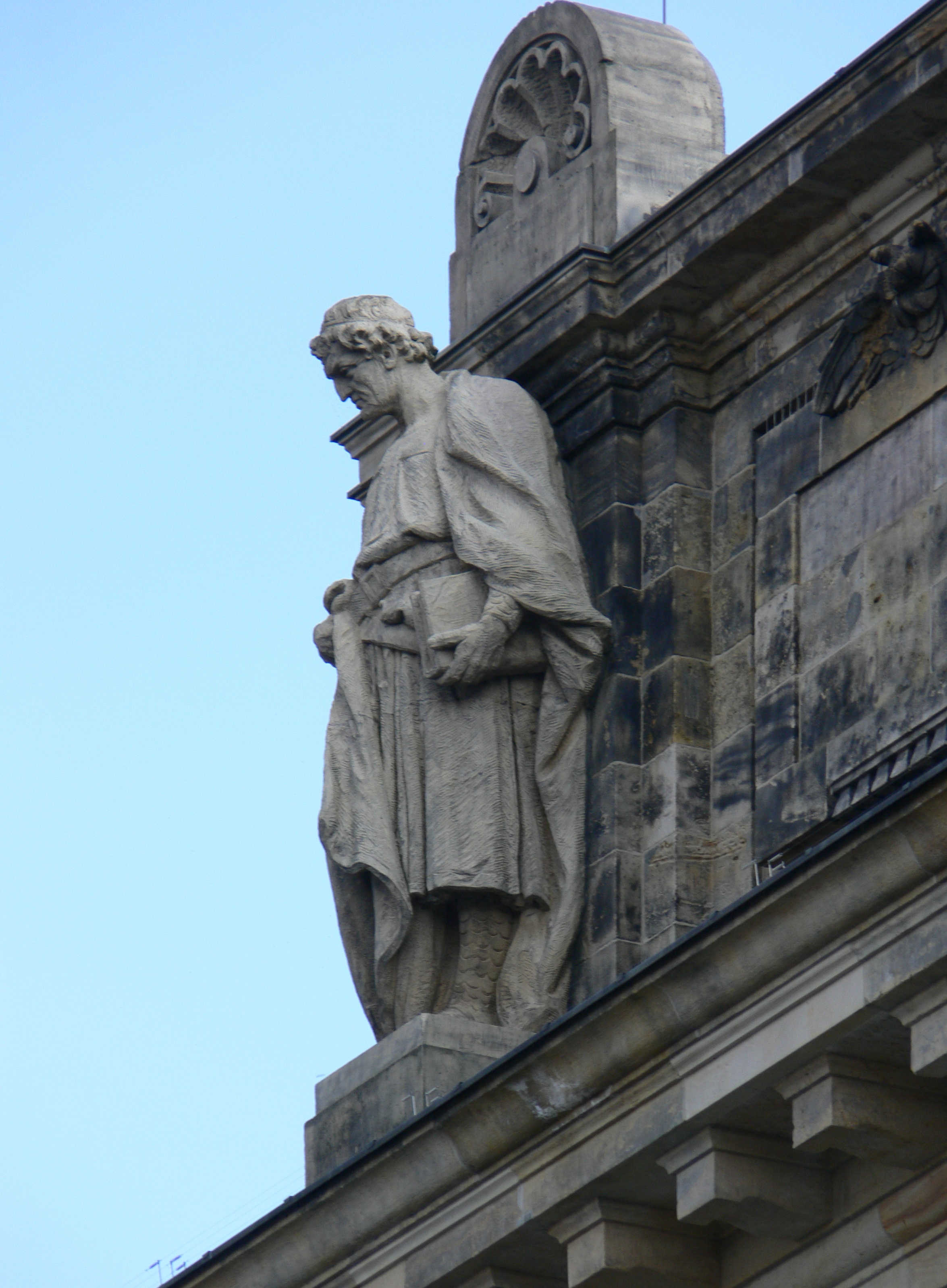 Leipzig, Reichsgerichtsgebäude Statue "Eike von Repgow"